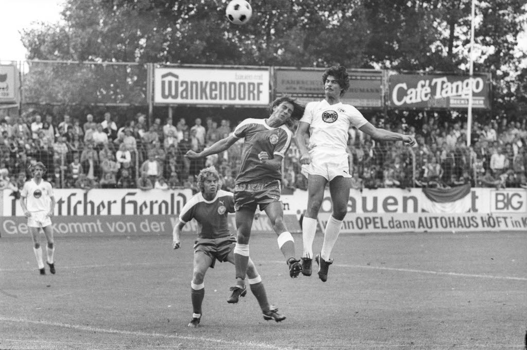 Freundschaftsspiel im Holsteinstadion.